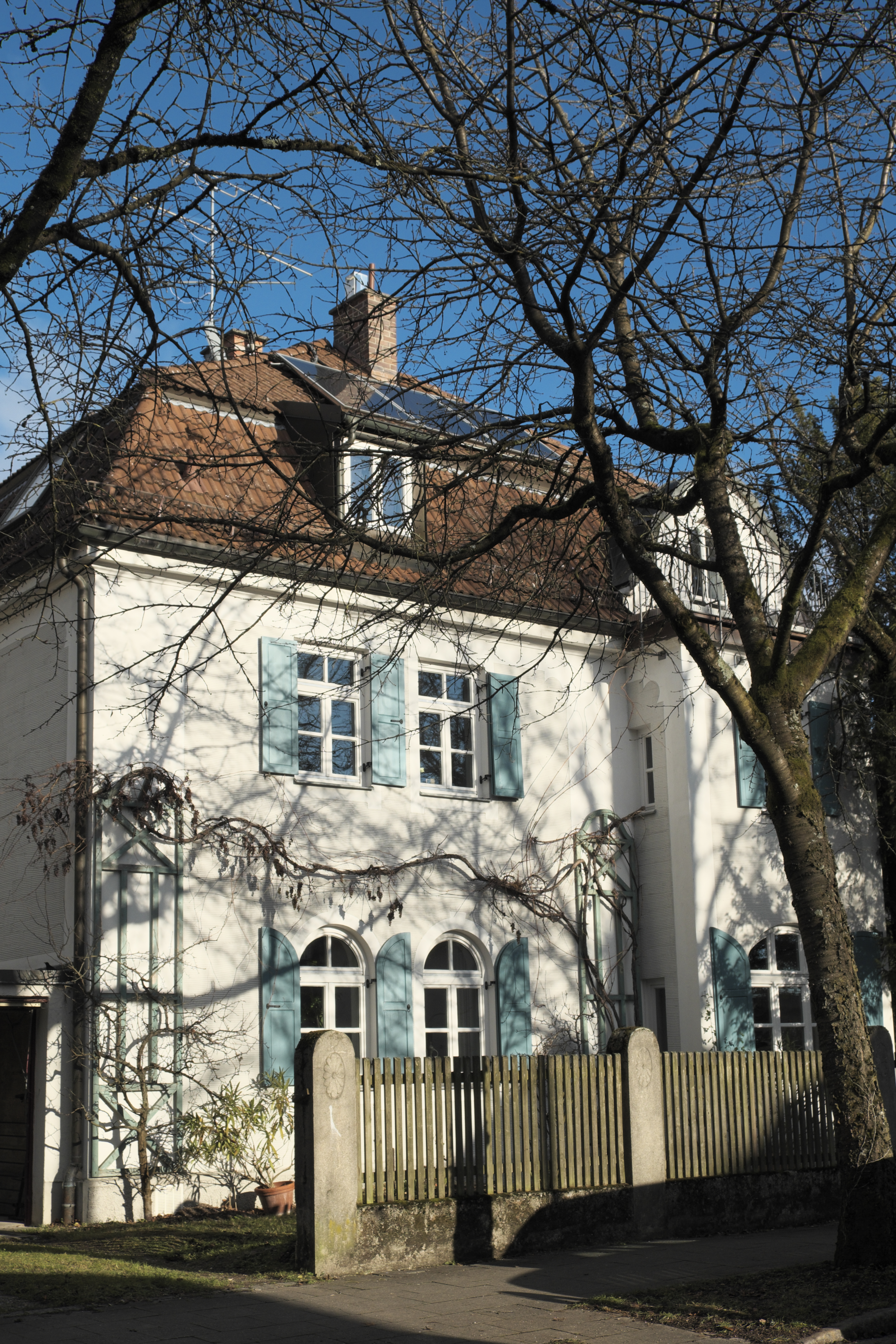 Villa in der Marschnerstraße 22 in Pasing im Stadtbezirk Pasing-Obermenzing in München (Bayern/Deutschland), 1902 von Otto Numberger errichtet